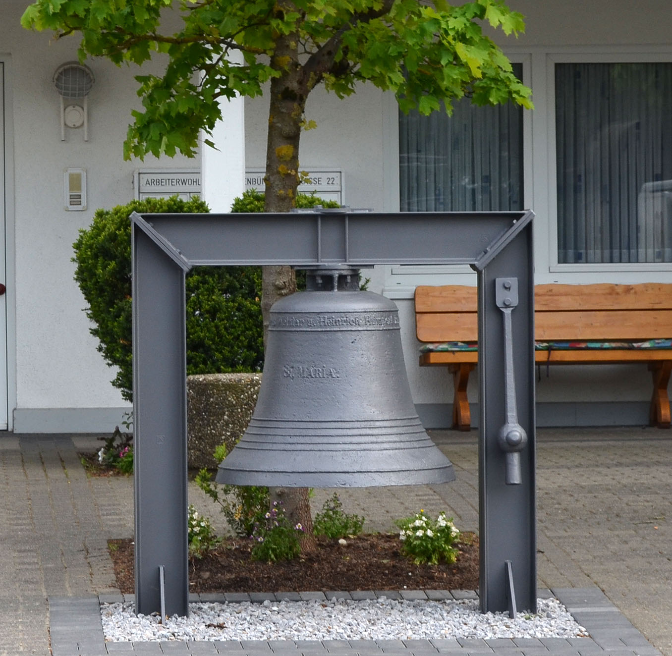 Brilon Glocke von Humpert am ehemaligen Produktionsgelände